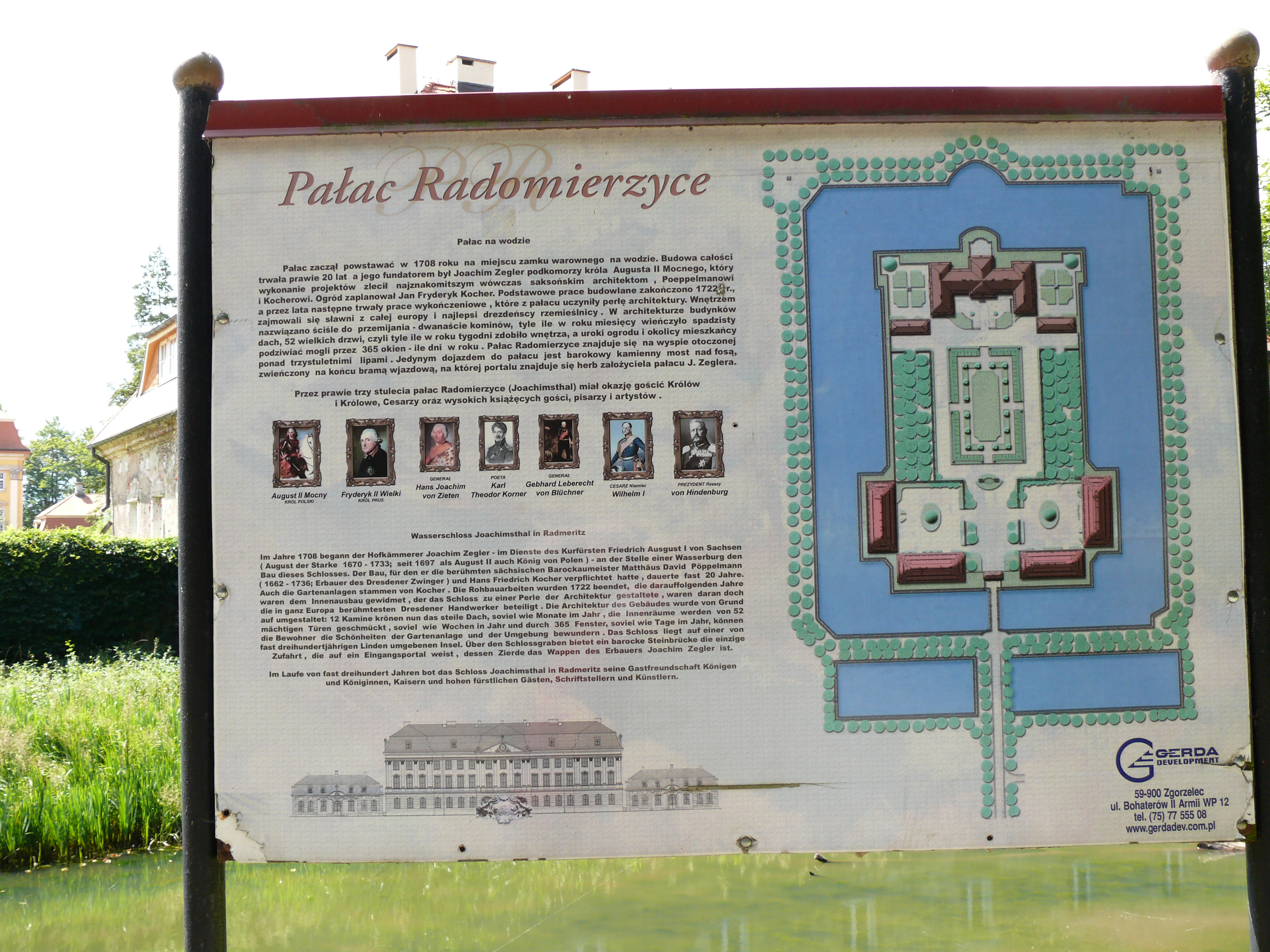 Radomierzyce - pałac, tablica informacyjna (zabytek nr 505 z 24.08.1959)